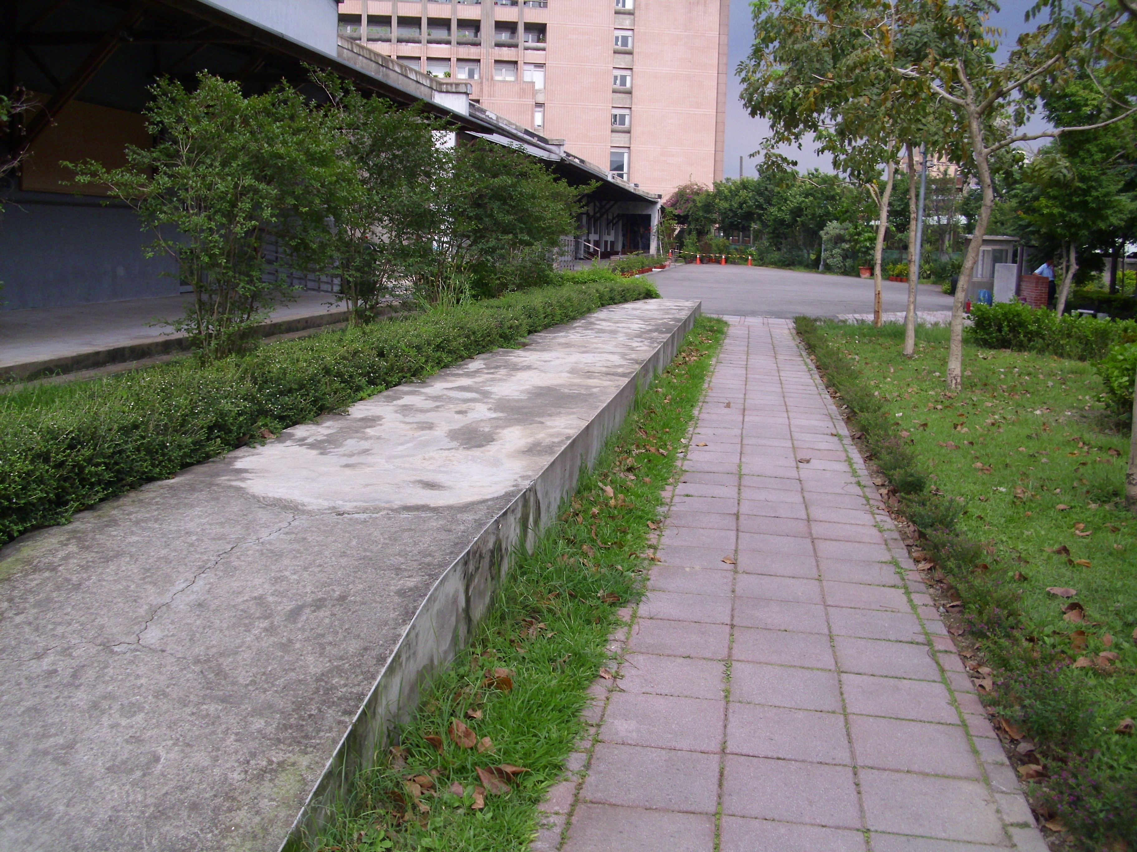 臺北製糖所的月臺